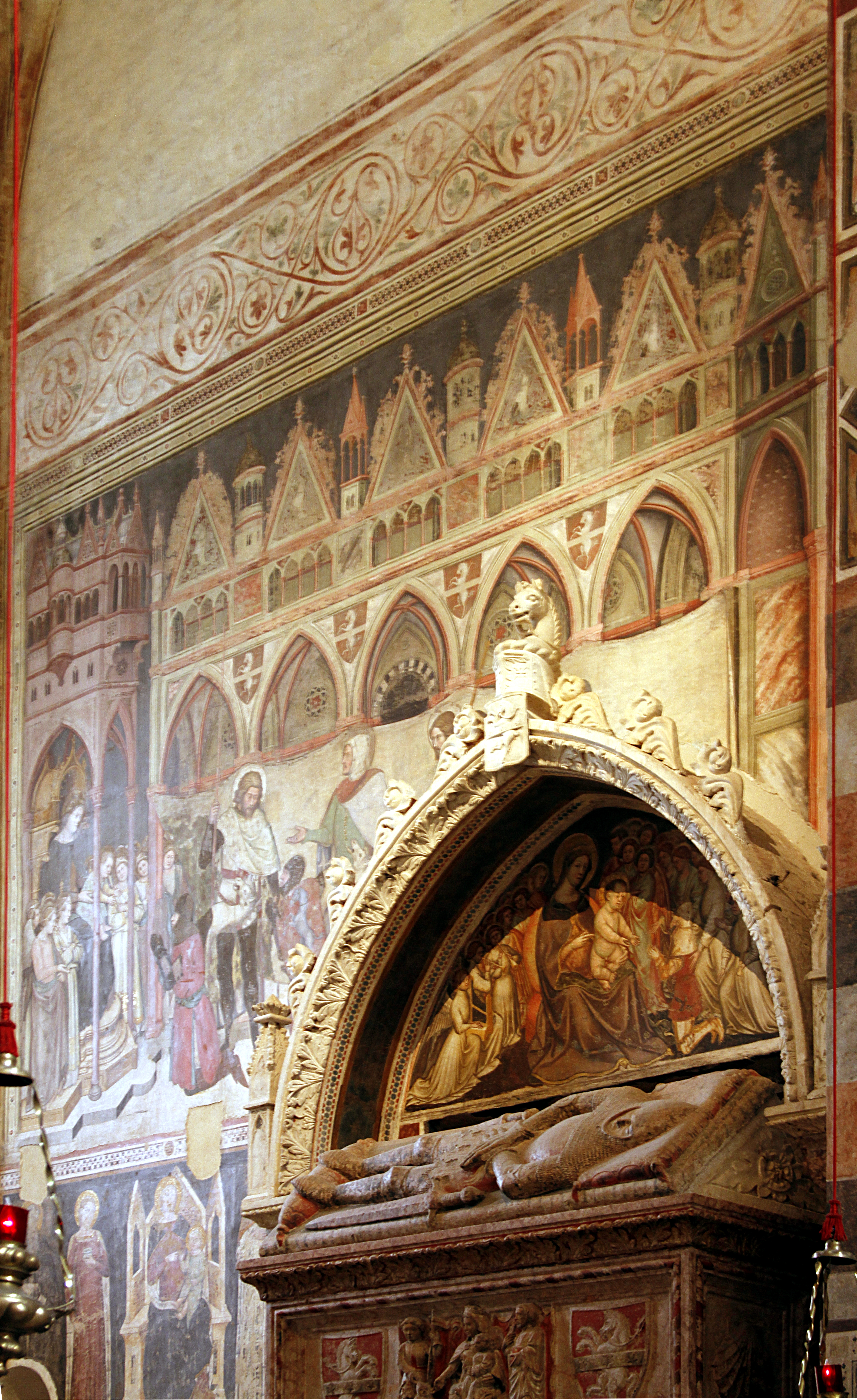 Sant'Anastasia - Verona